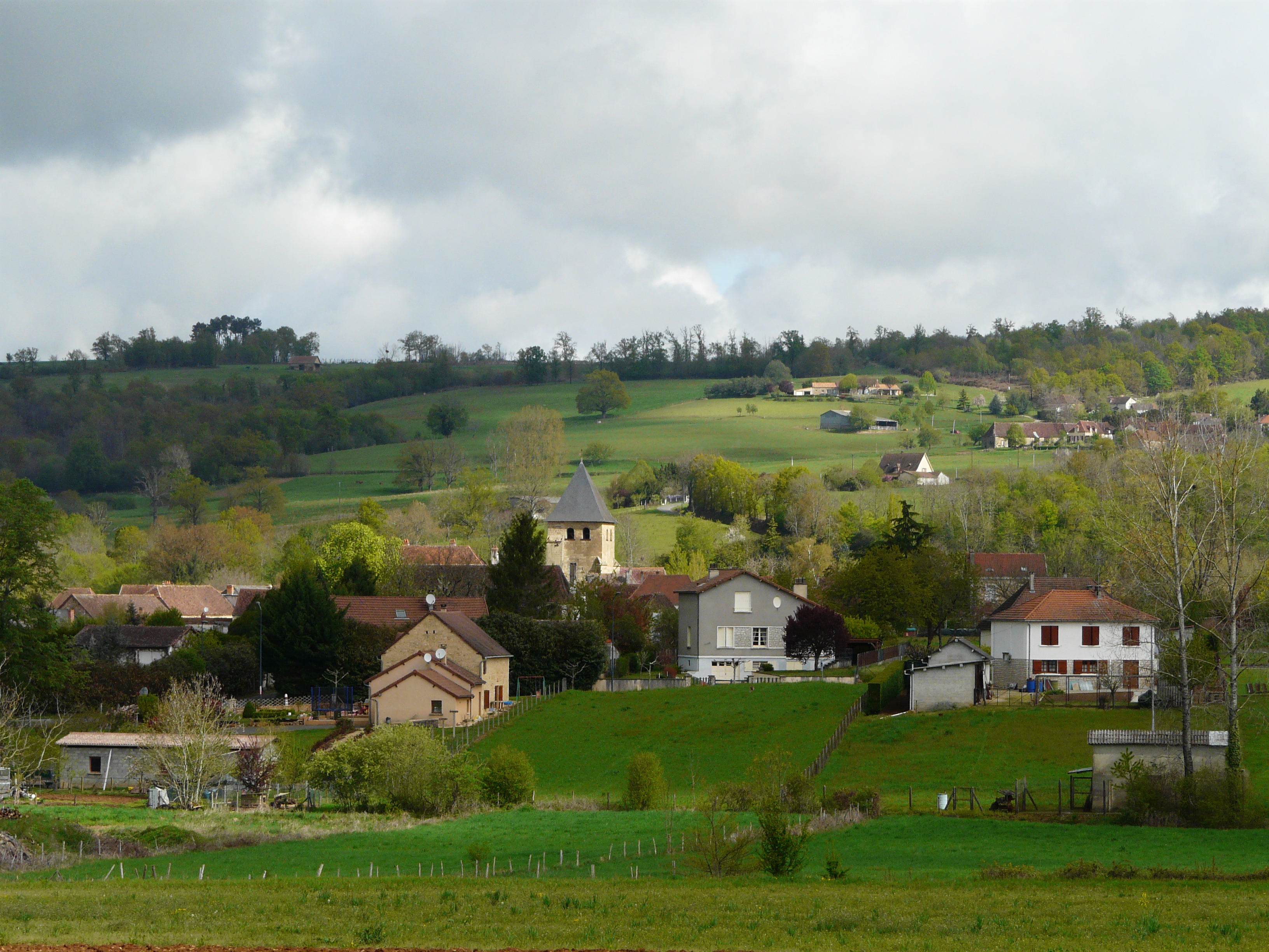 Le village de Saint-Médard-d'Excideuil, Dordogne, France.